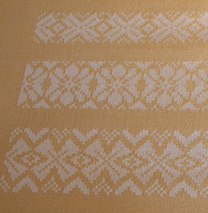 Damast med dragutrustning och "upphämtabårder".